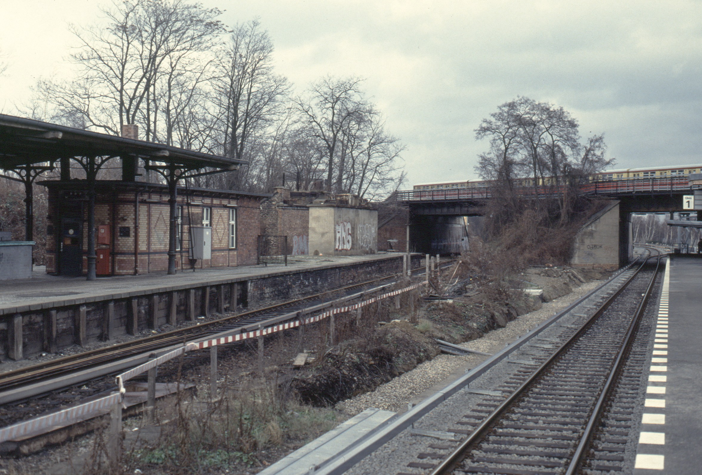 Bahnhof Berlin Papestraße (Anhalter Bahn)